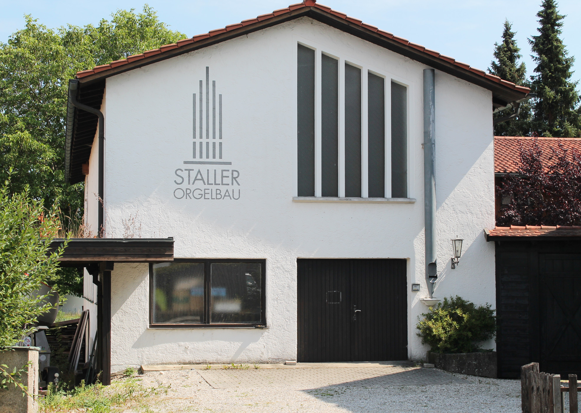 Werkstatt von Orgelbau Staller in Grafing bei München